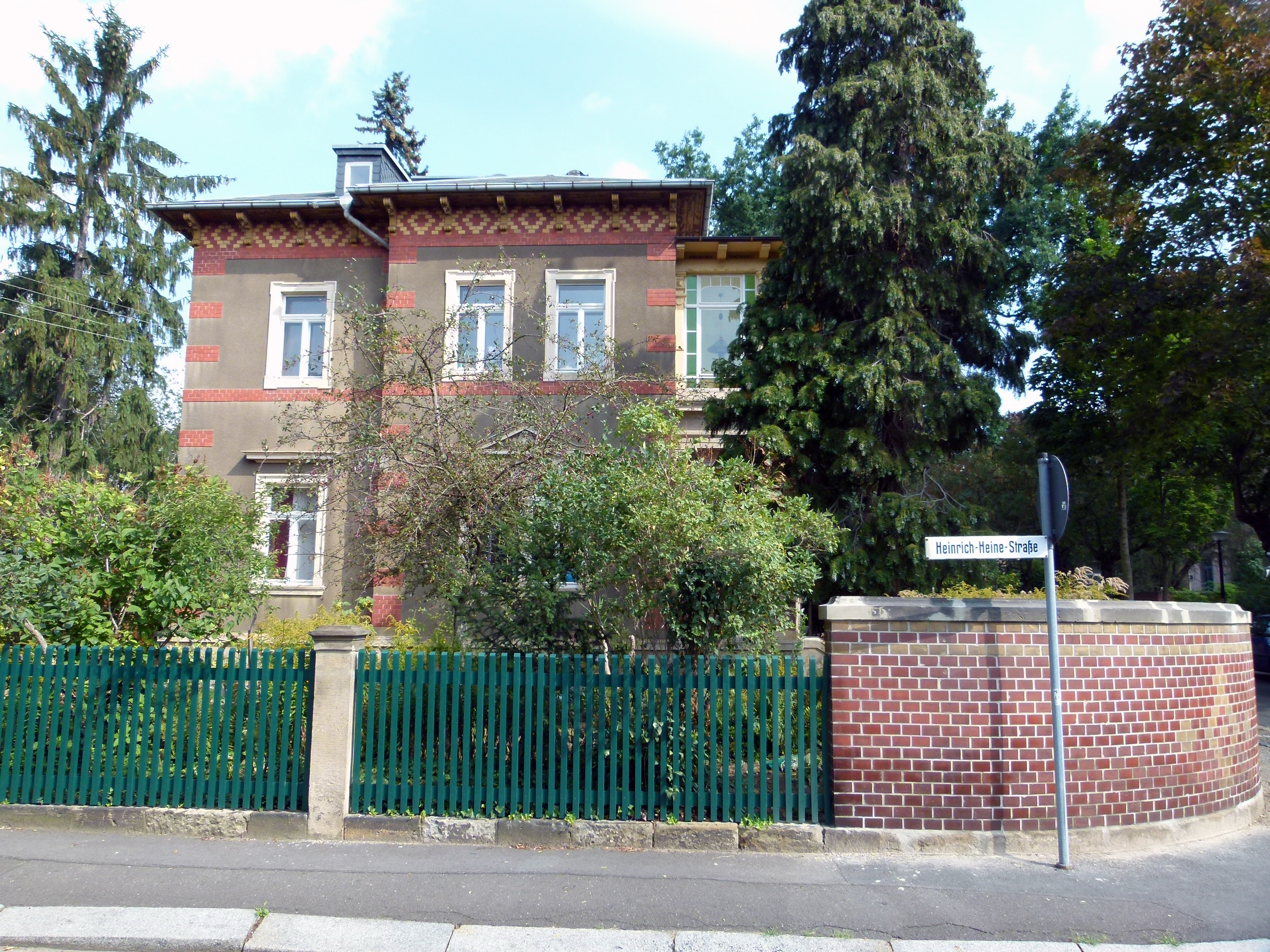 Denkmalgeschütztes Haus, Heinrich-Heine-Straße 10, Radebeul, Sachsen